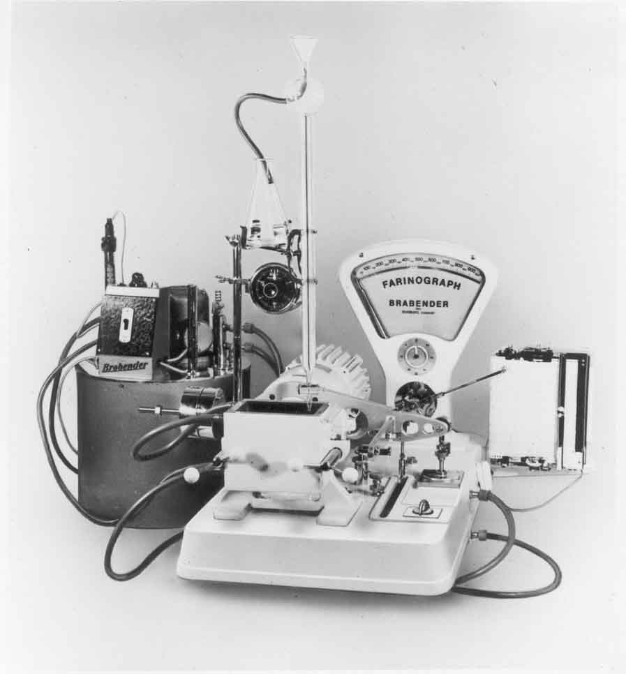 Erster Farinograph von 1928